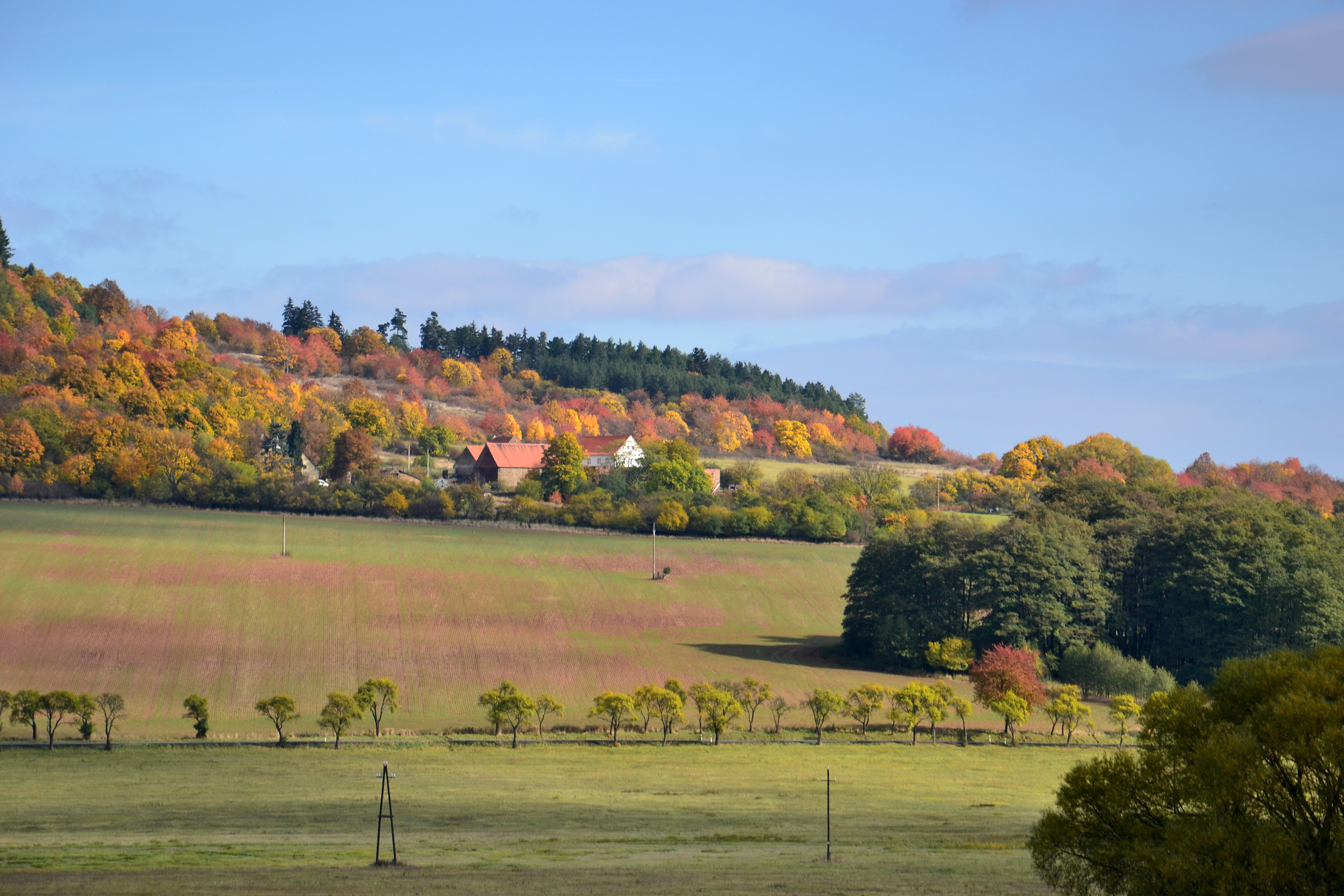 Vladořice – pohled z jihozápadu (od Kolešova)